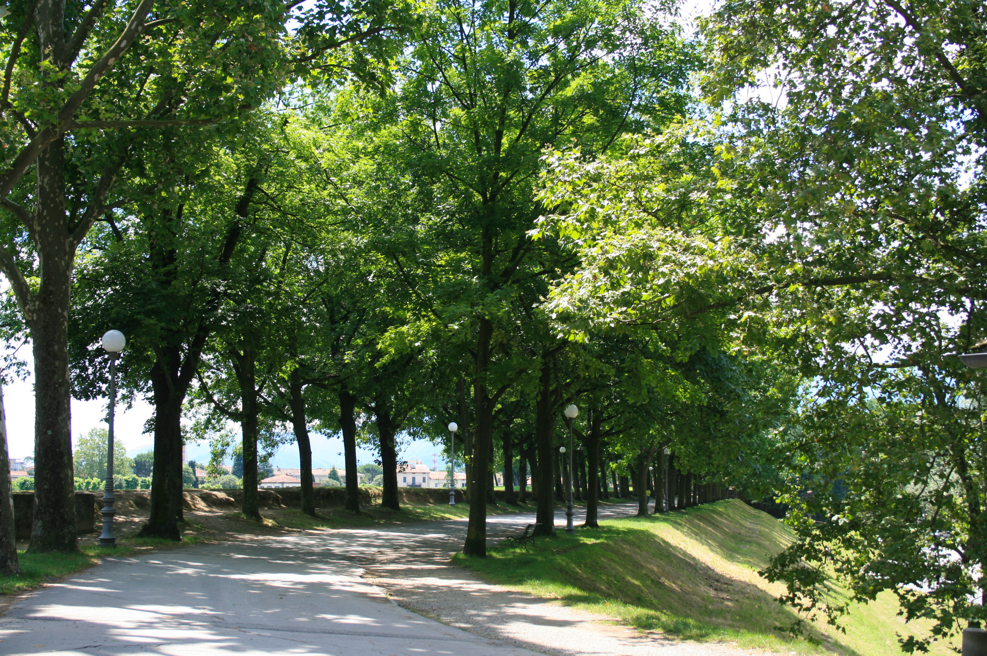 Mura intorno al Villaggio del Fanciullo (LUCCA)